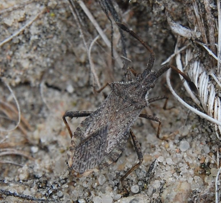 Coriomeris scabricornis